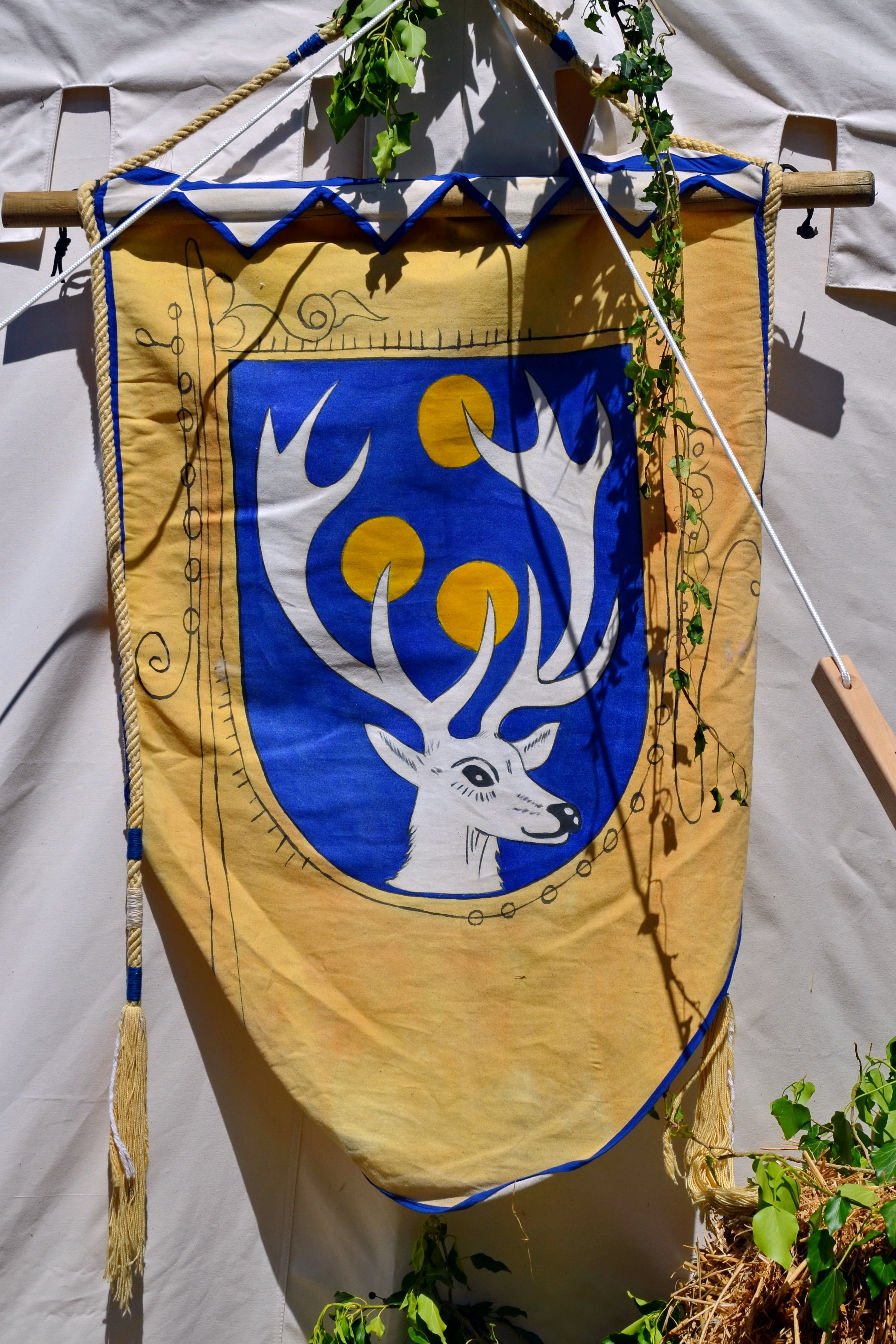 Mittelalter Spectaculum (23. bis 25. Mai 2014) der Gesellschaft zu Fraumünster auf dem Münsterhof in Zürich